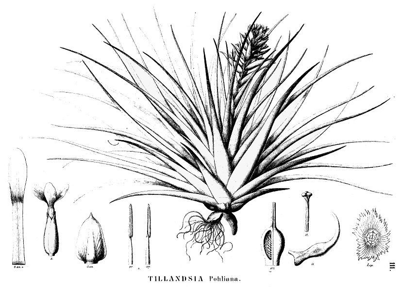 Martius, Flora Brasiliensis : tab. 111